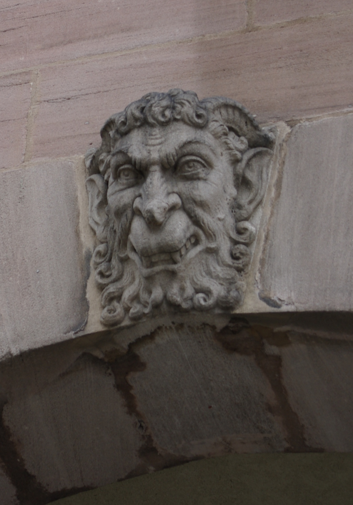 Fratzenkopf über einem Torbogen an der Theresienstraße 5 in Nürnberg